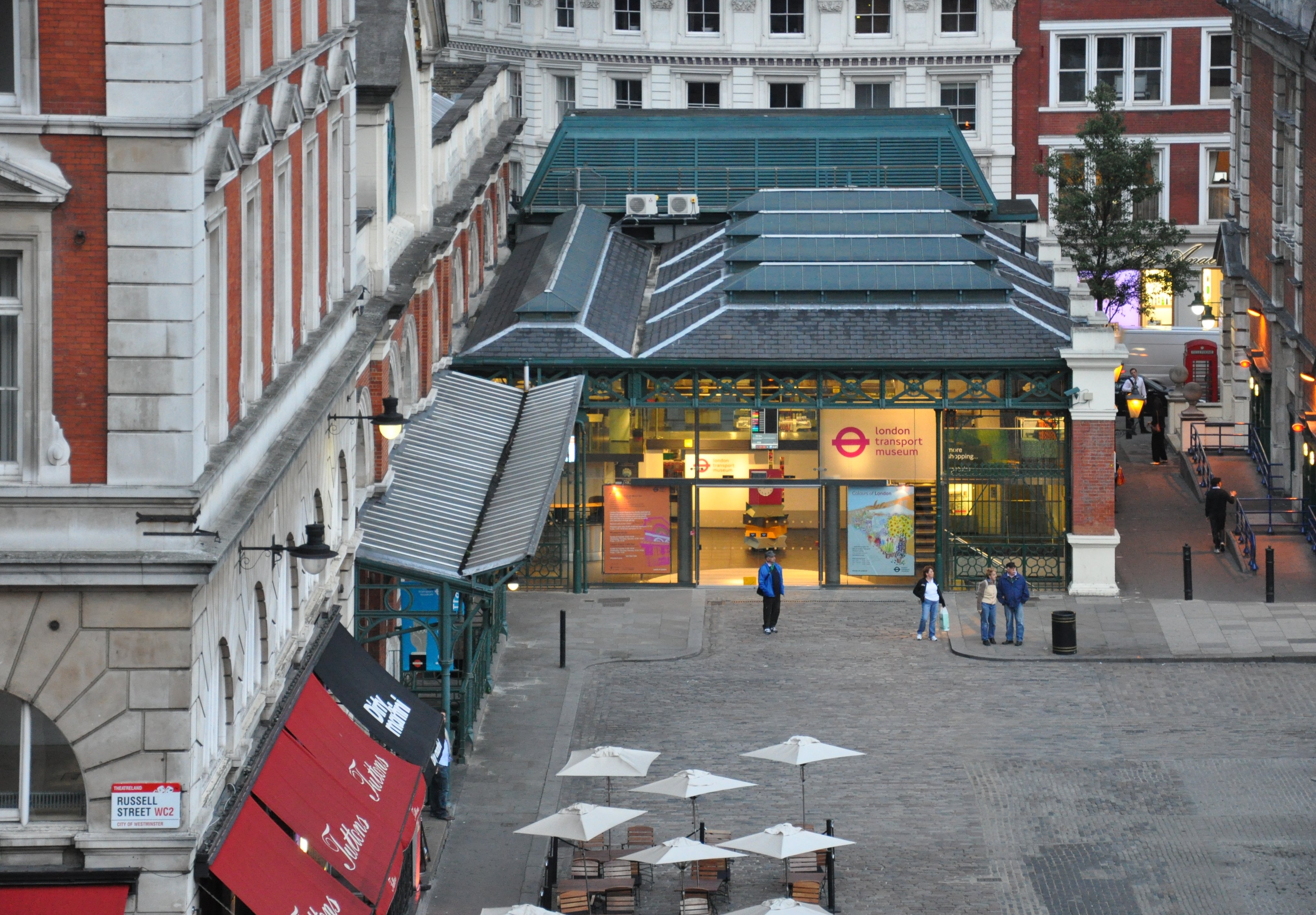 London, London Transport Museum, Covent Garden